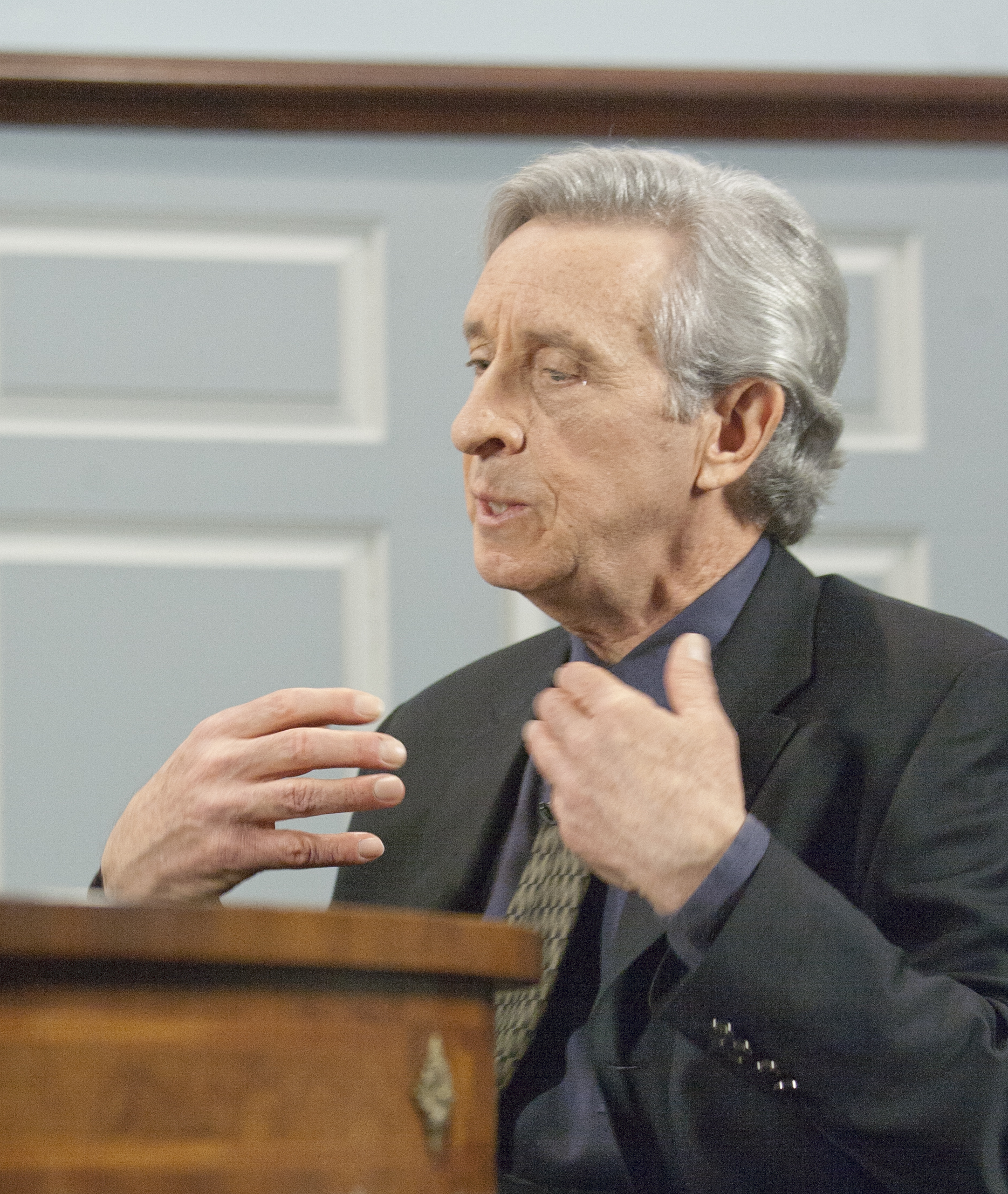 RS3J5085